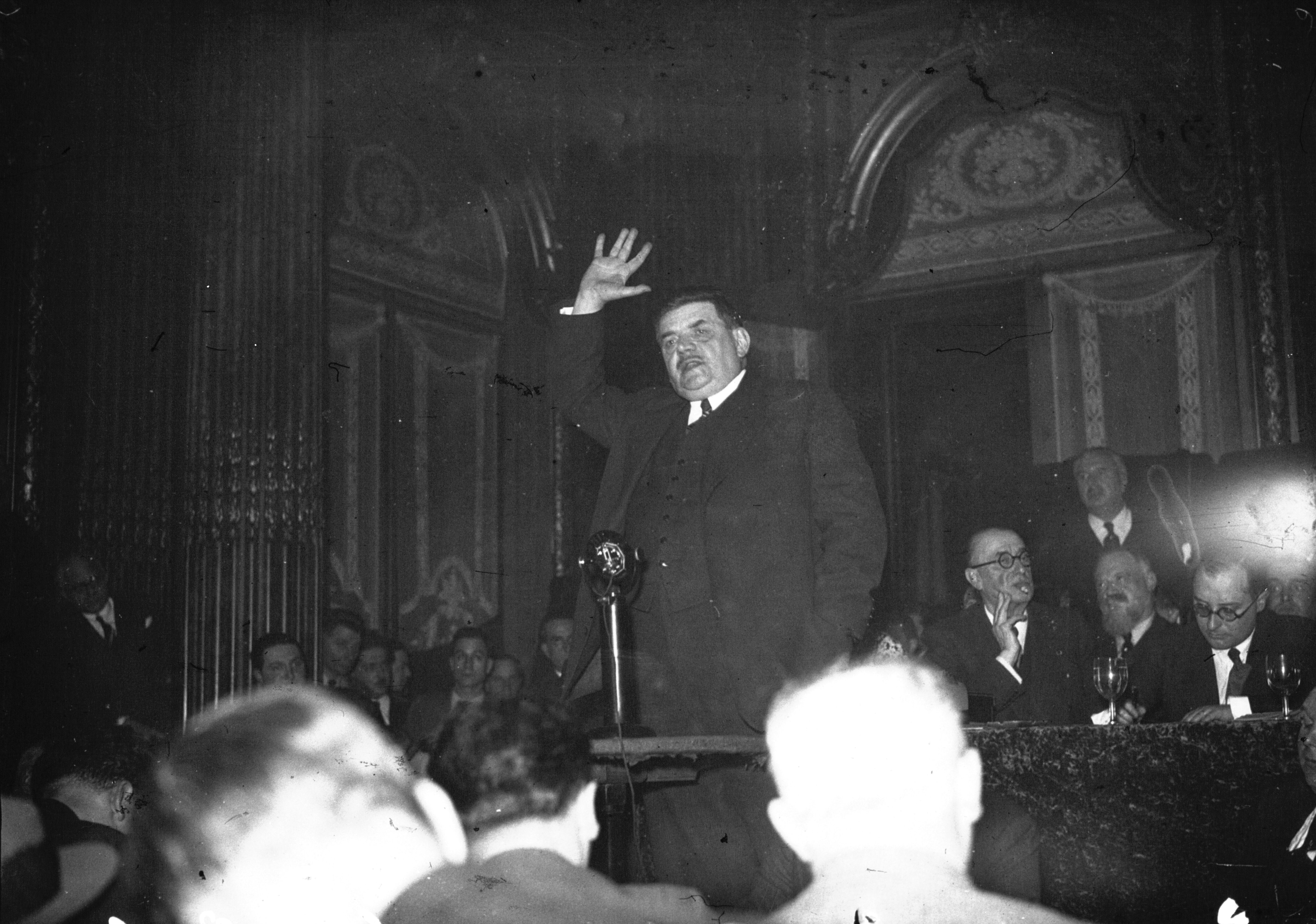 Édouard Herriot prononçant un discours, 1936. Photographie de presse, négatif sur verre ; 13 x 18 cm (sup.) ou moins.